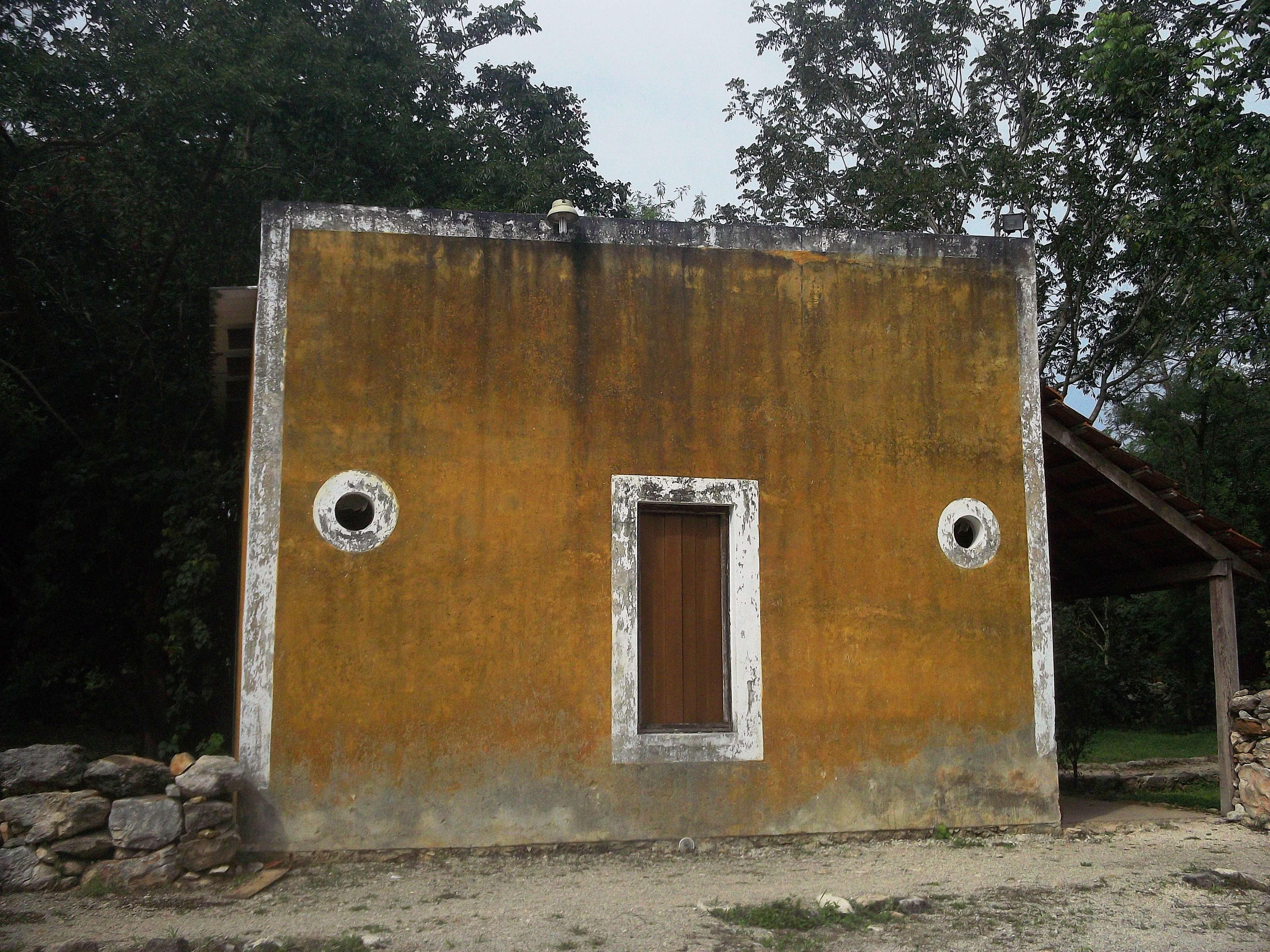 Hacienda de San Pedro Ochil, Yucatán.